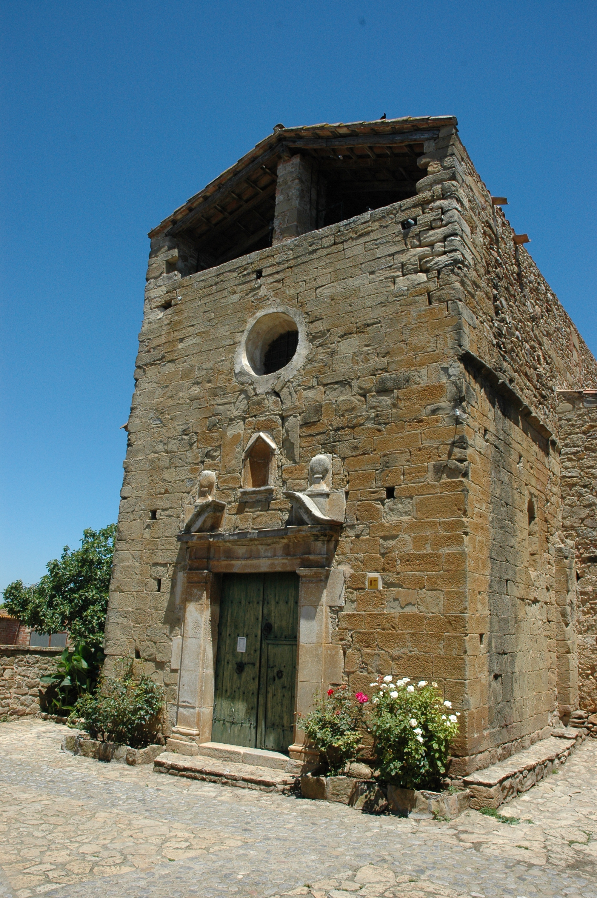 Sant Genís de Casavells - Porta